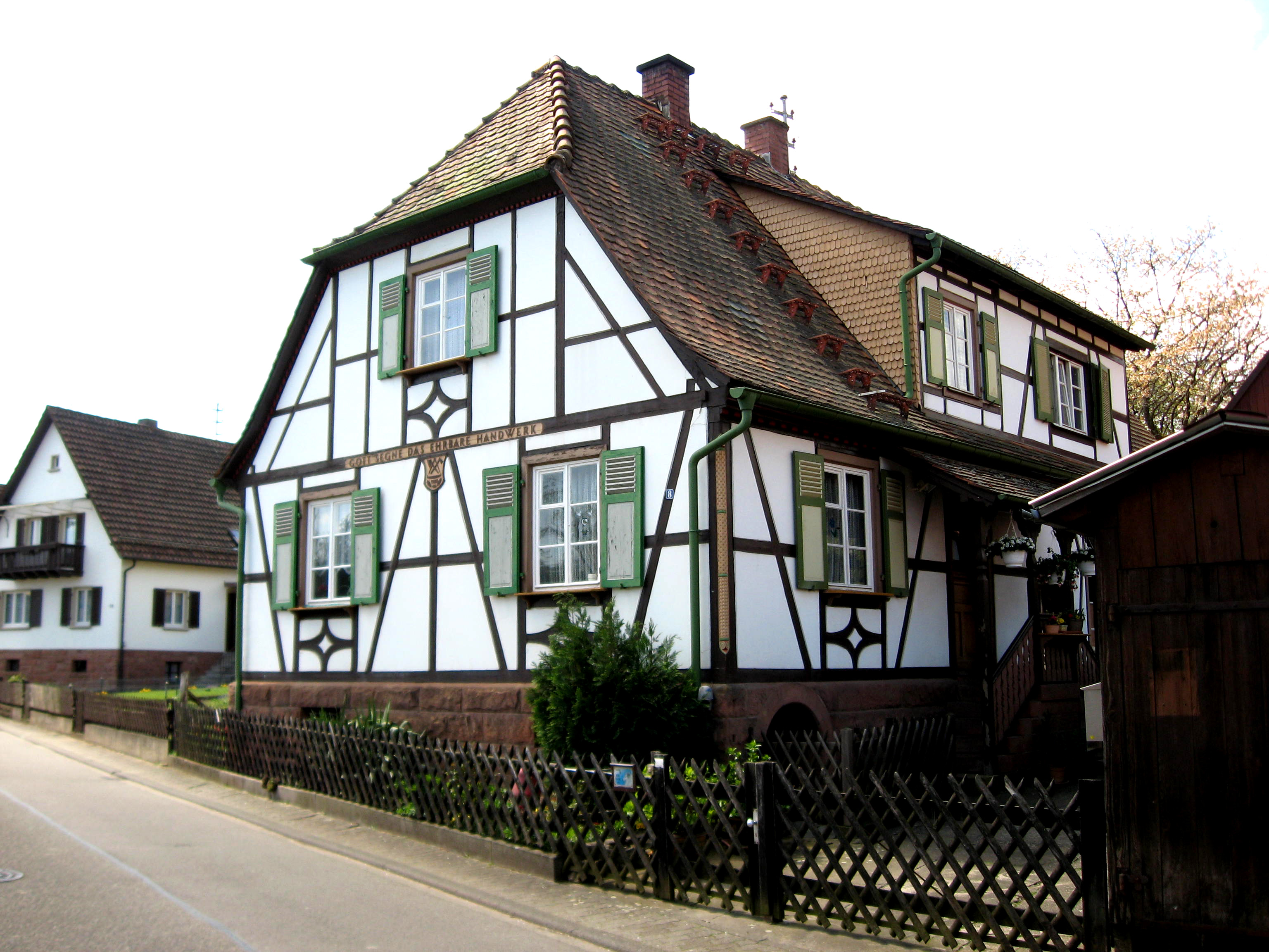 Fachwerkhaus Kapellenstraße 8 in Wernersberg; geschnitzte Eckpfosten; im Schwellholz Inschrift: GOTT SEGNE DAS EHRBARE HANDWERK, darunter Zimmermannszeichen und Jahreszahl 1926